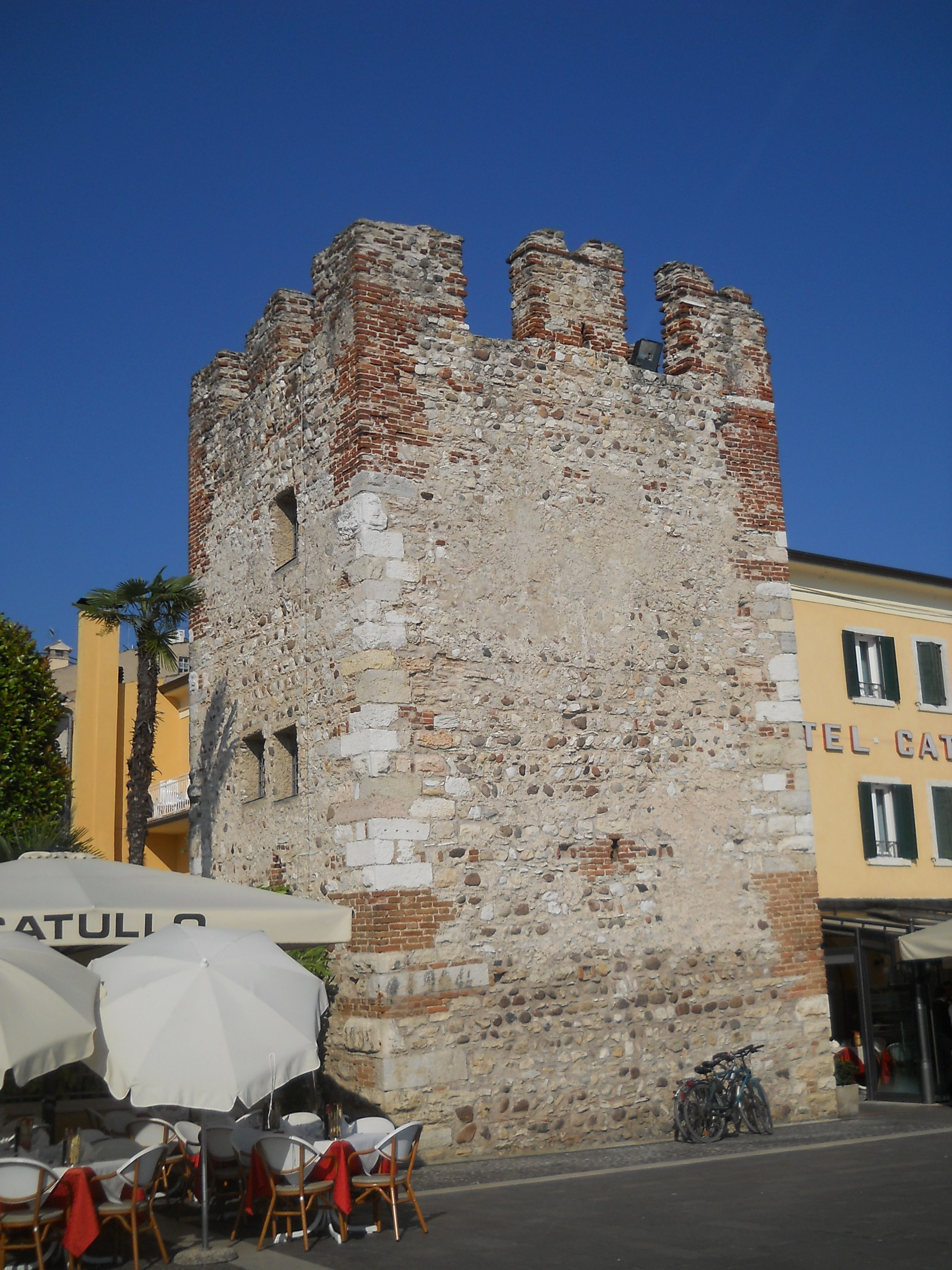 Resti delle fortificazioni di Bardolino